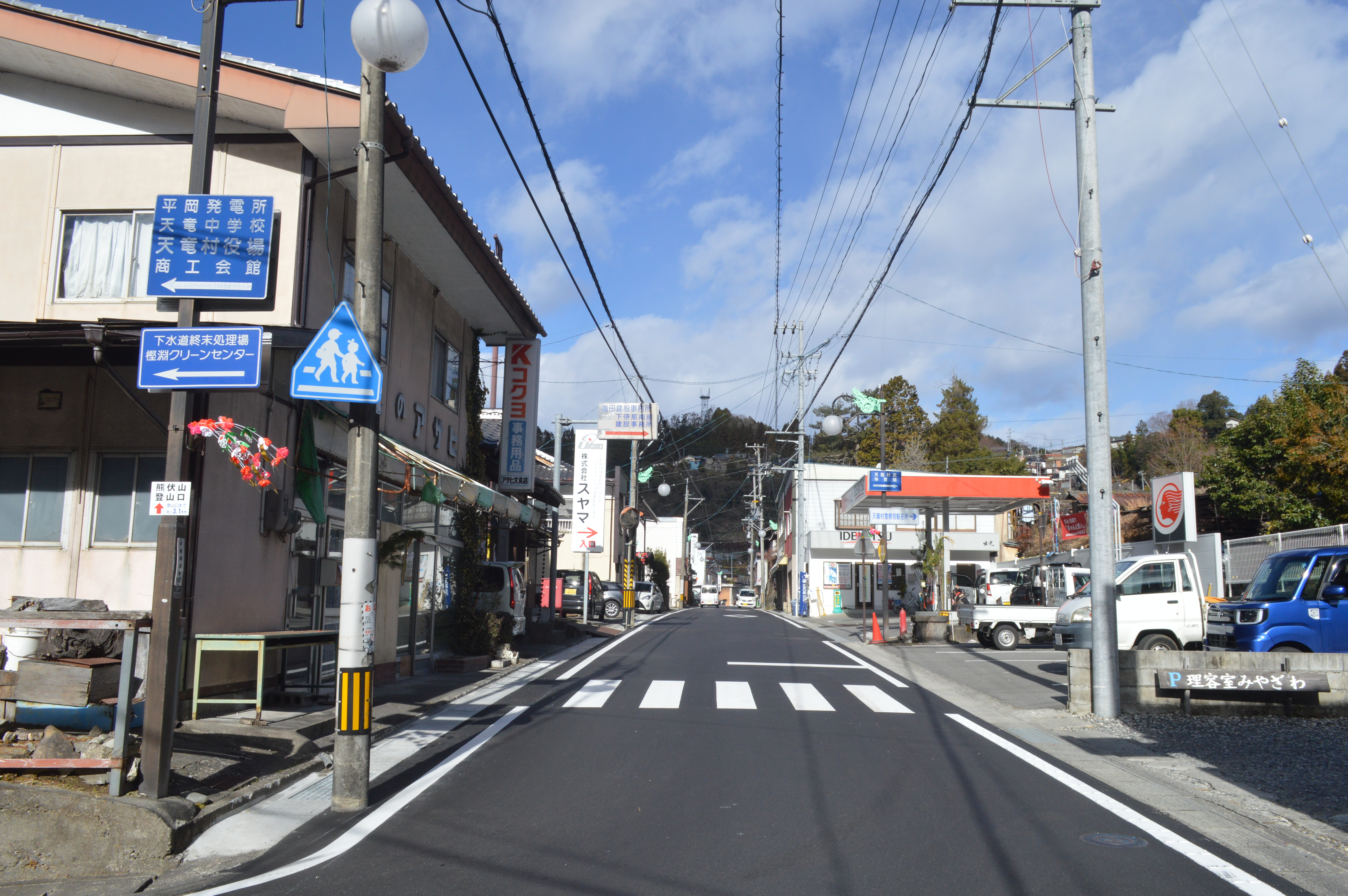 国道418号。長野県下伊那郡天龍村平岡。天龍村中心部。